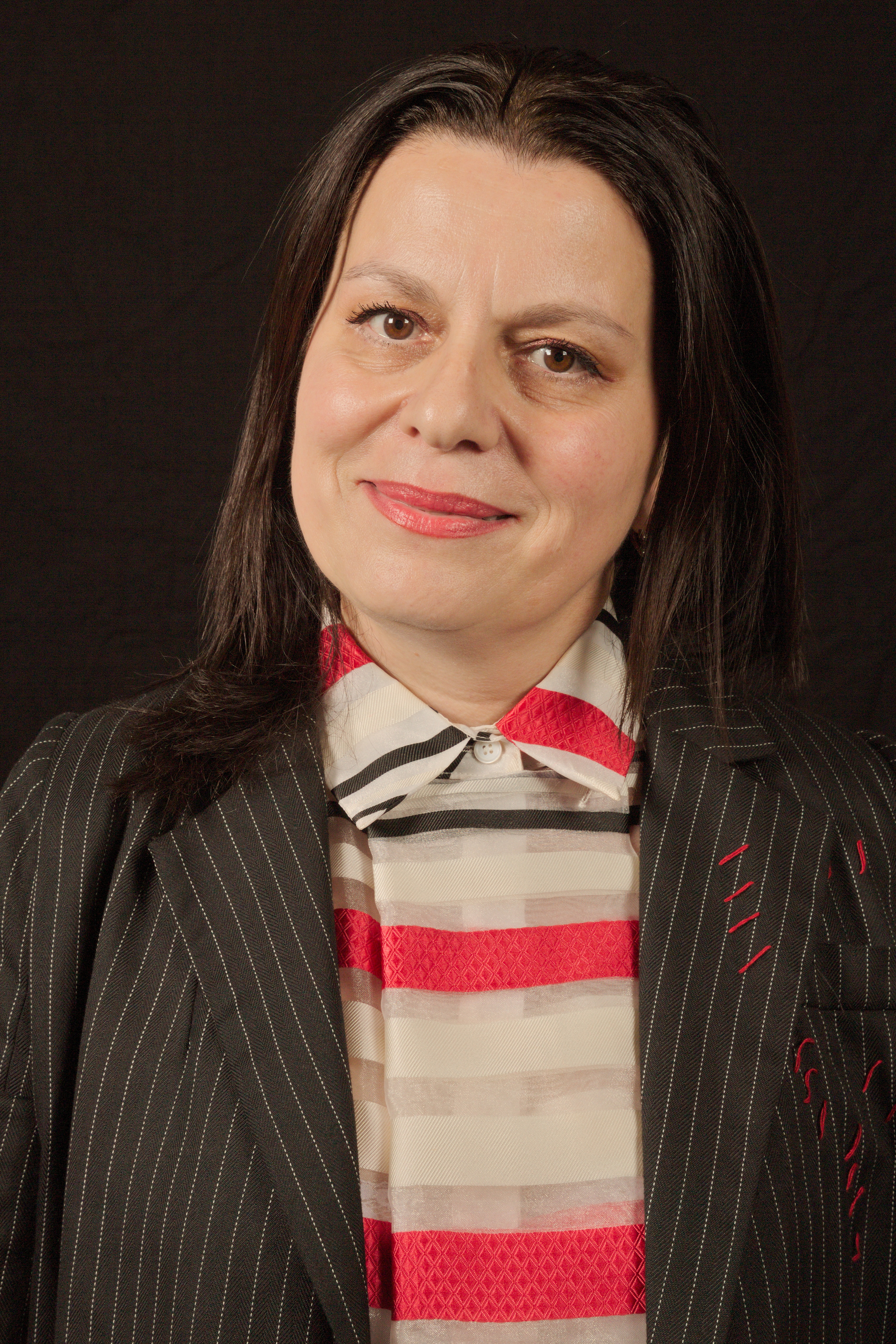 Nugesha Gagnidze auf der Frankfurter Buchmesse 2018